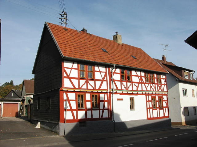 Aufnahme nach gelungener Sanierung 2009